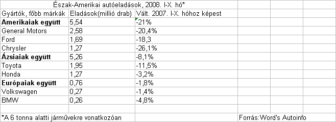 Észak-amerikai autóeladások 2008 I-X.